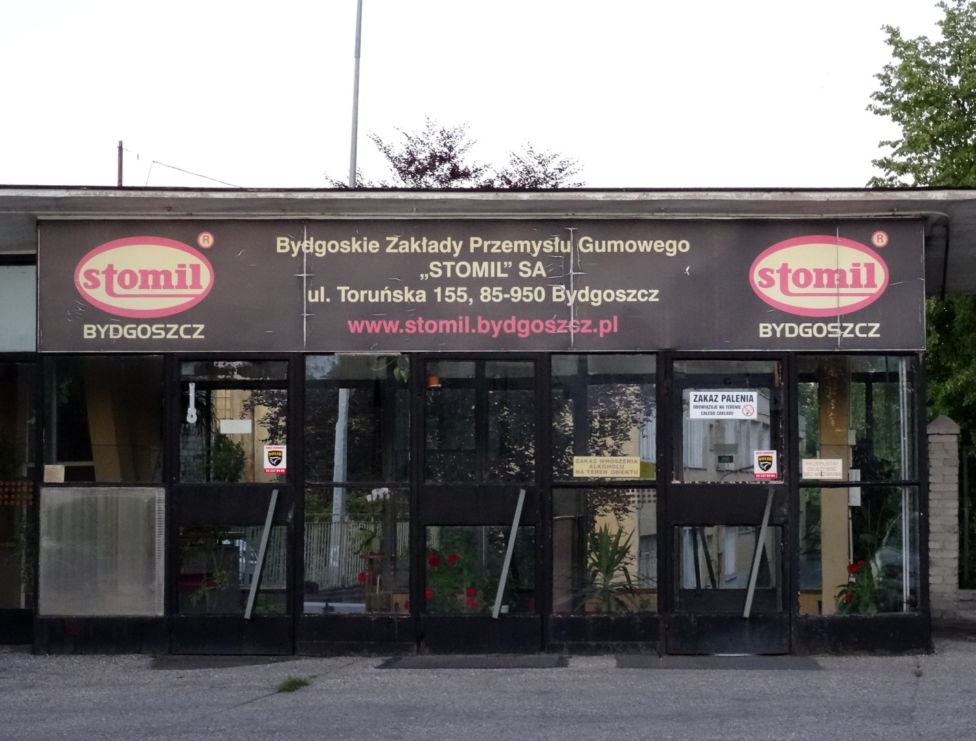 Bydgoskie Zakłady Przemysłu Gumowego Stomil S.A., ul. Toruńska 155 w Bydgoszczy